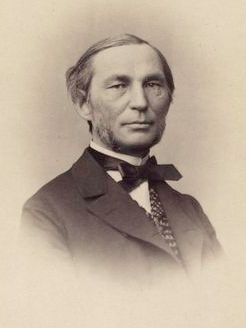 Чебышёв, Пафнутий Львович